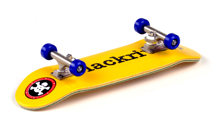 A Berlinwood Deck